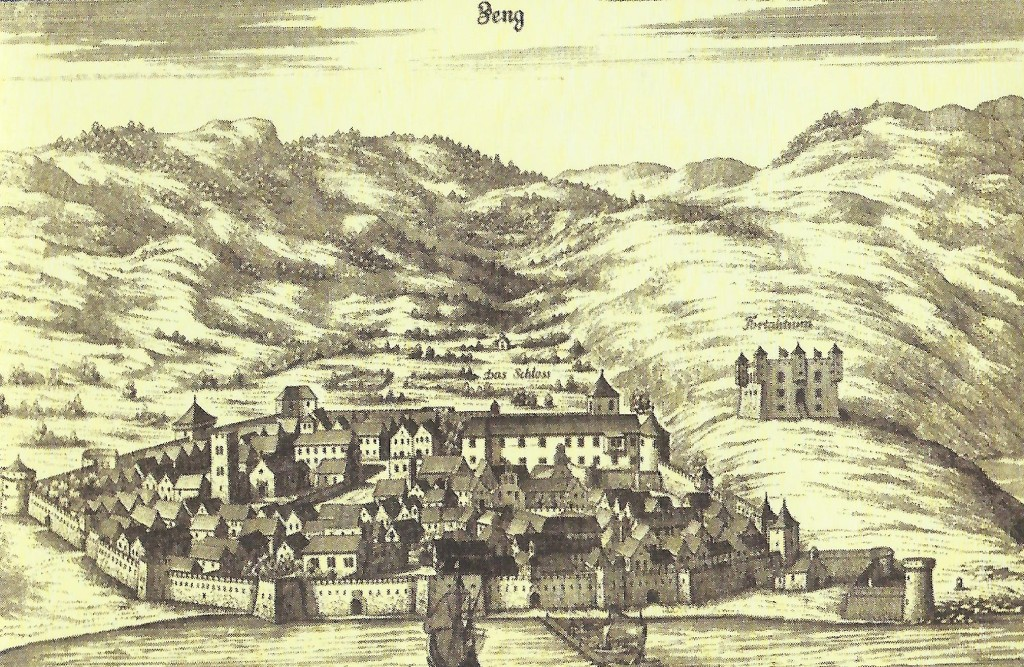 Senj, bakrorez J.W. Valvasora iz 1689. godine